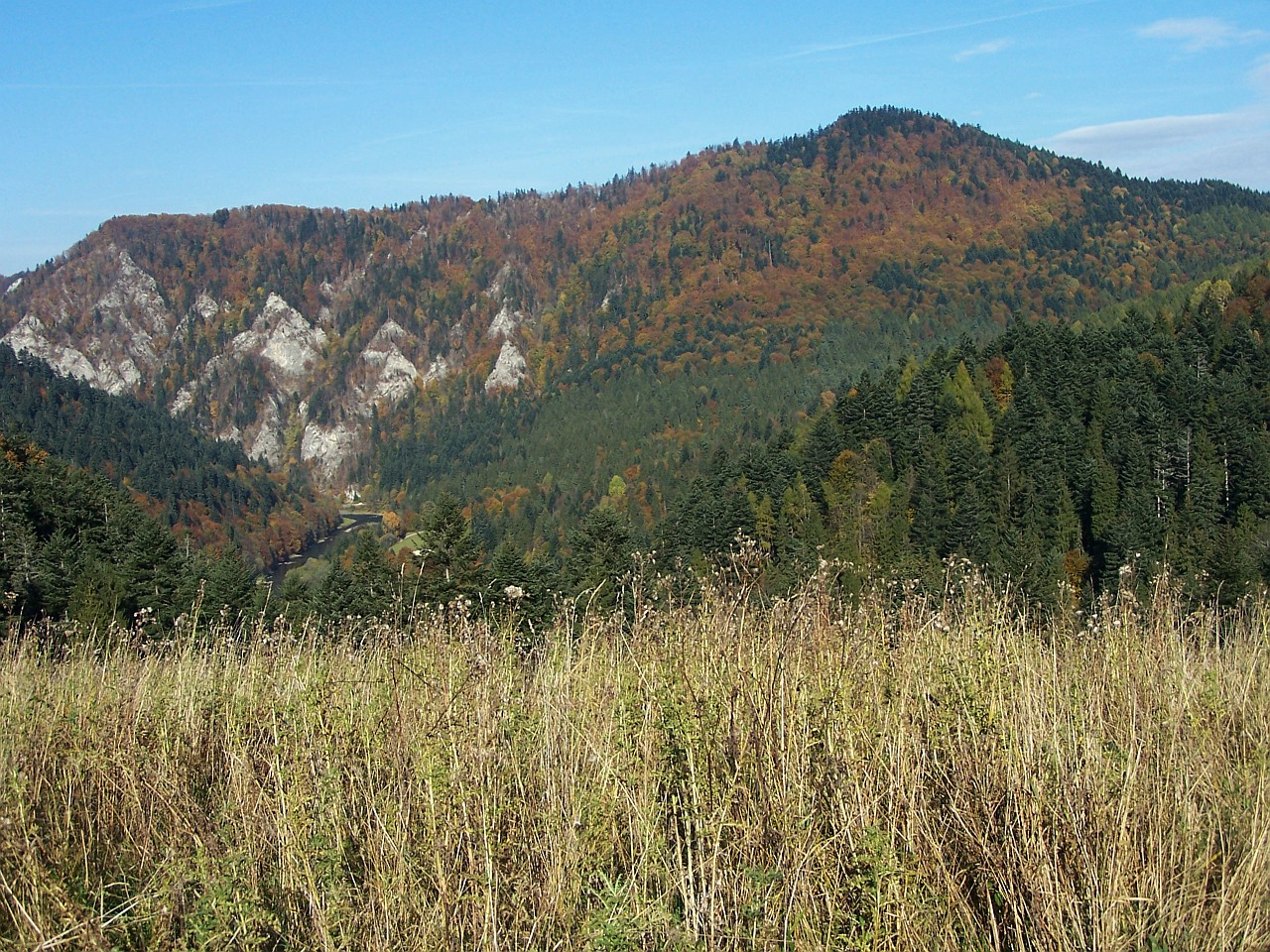 Golica w słowackich Pieninach, widok z okolkic przełęczy pod Klasztorną Górą